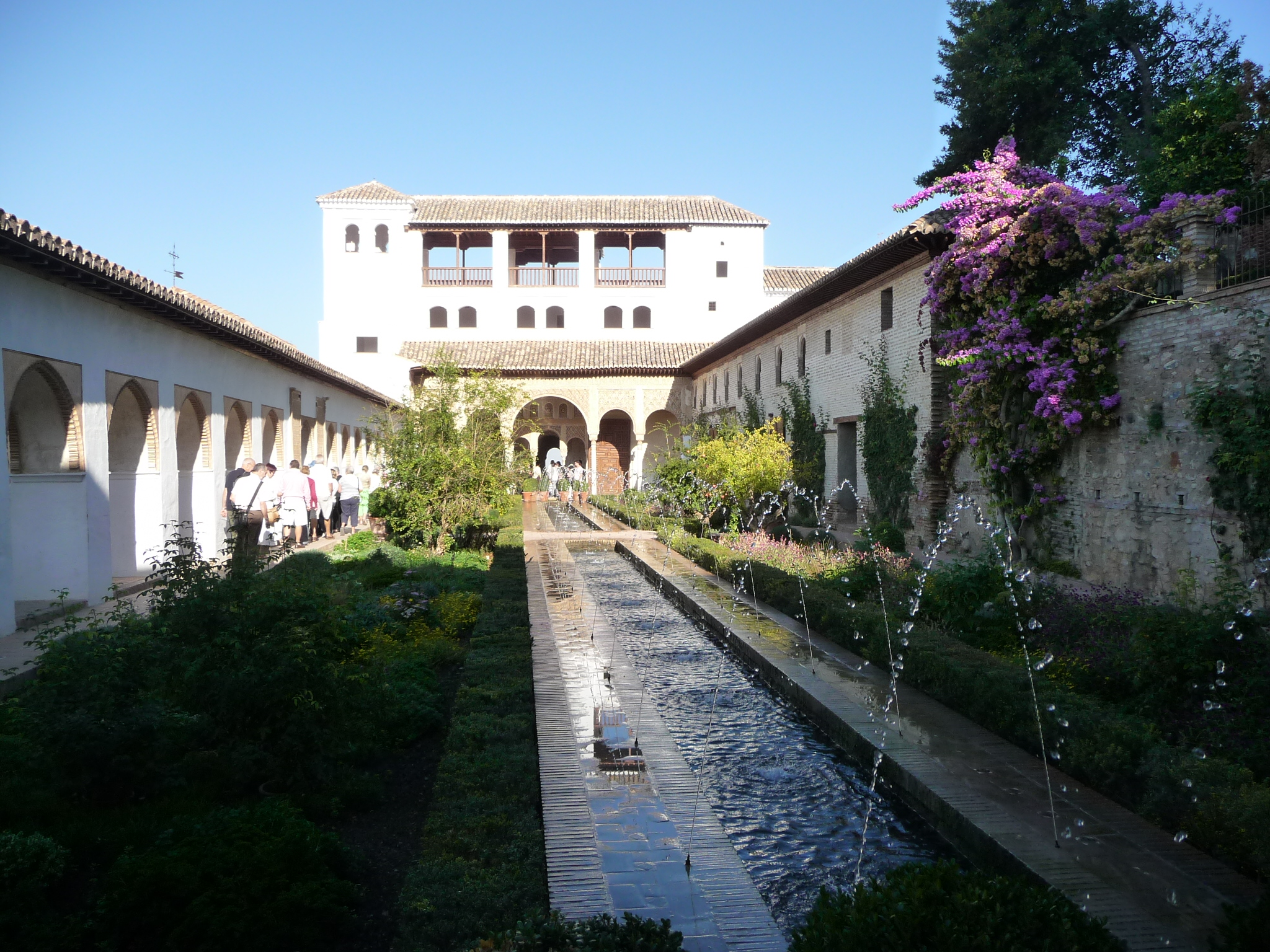 Granada-P1040976.JPG